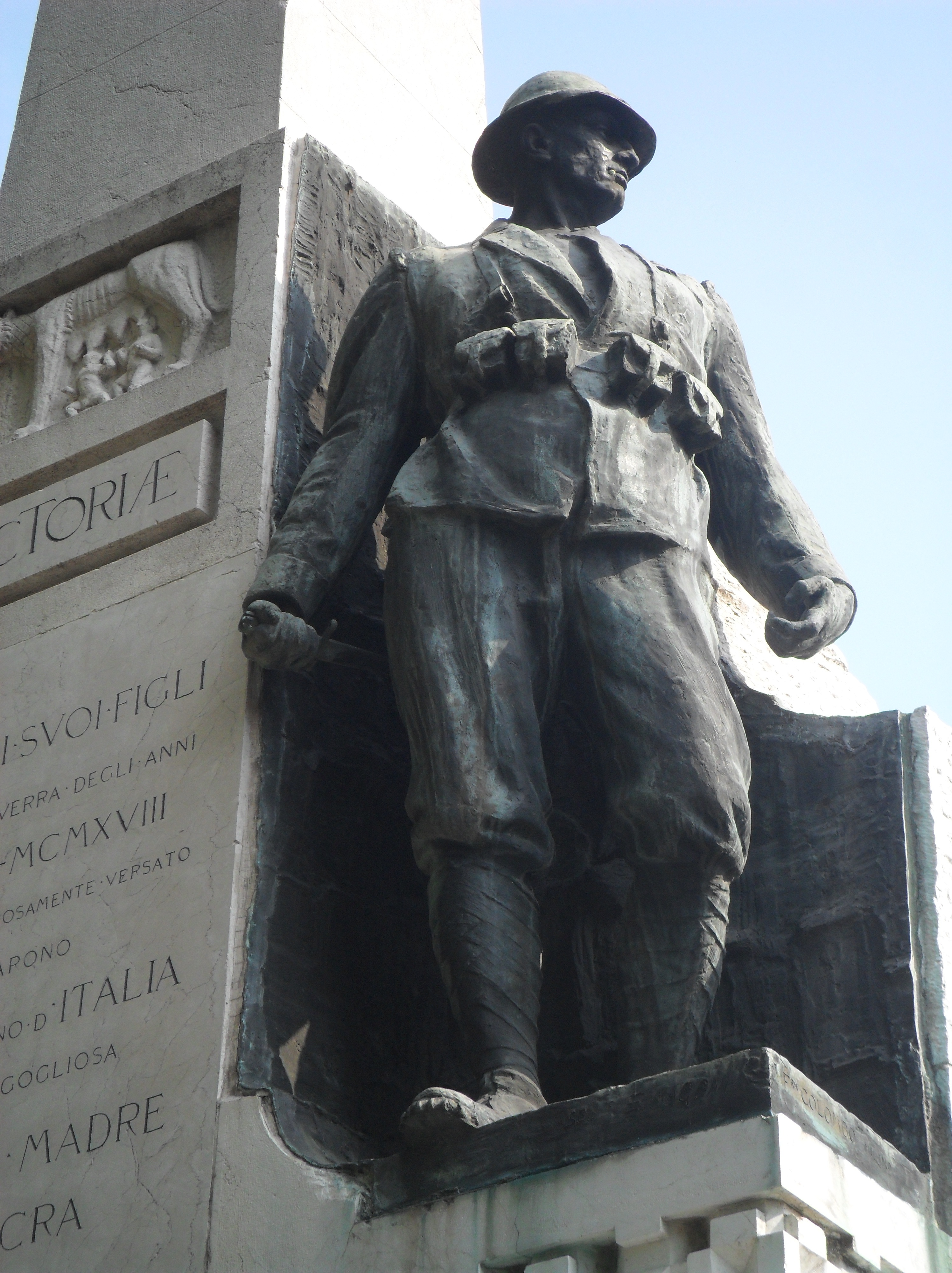 Monumento ai Caduti. Brescia (S. Eufemia) Via della Rimembranza